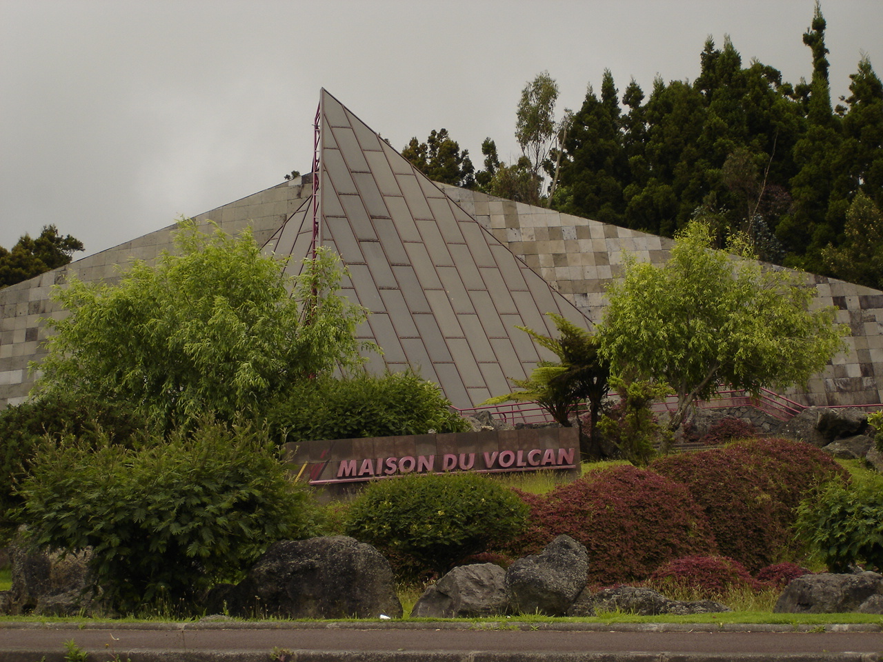 Description: La Maison du volcan, novembre 2004, La Réunion Source: Bouba